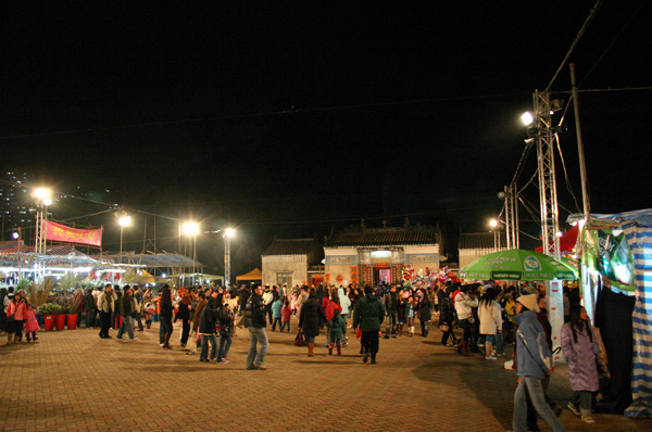 {后}-角天后廟與屯門年宵市場